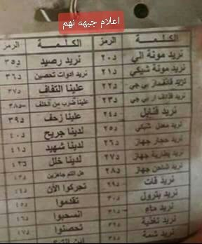 جدول رموز تكتيكية حوثية تم إكتشافها خلال معركة نهم في يناير 2020 وتحوي رموز يستخدمها الحوثيين للتواصل في ما بينهم